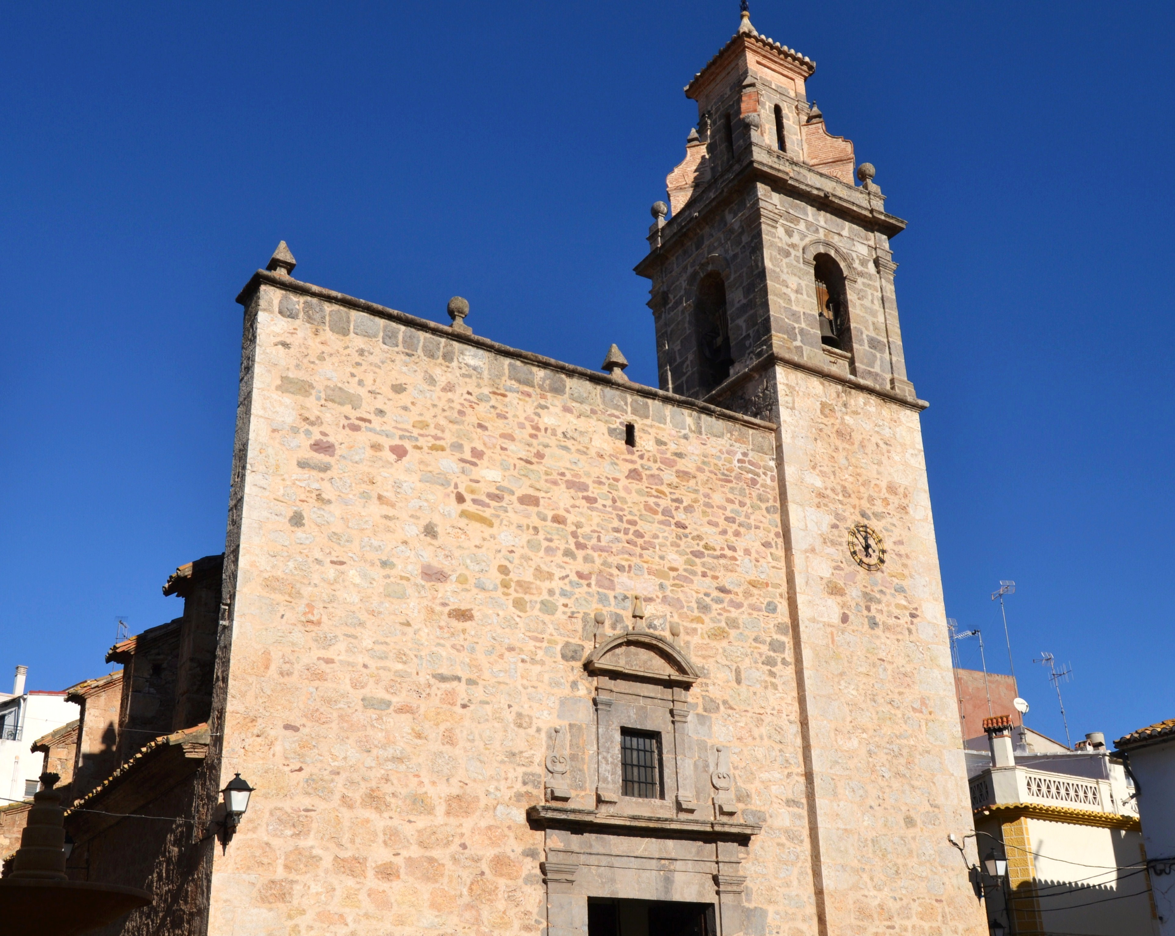 Església de la Mare de Déu de la Misericòrdia de Geldo.